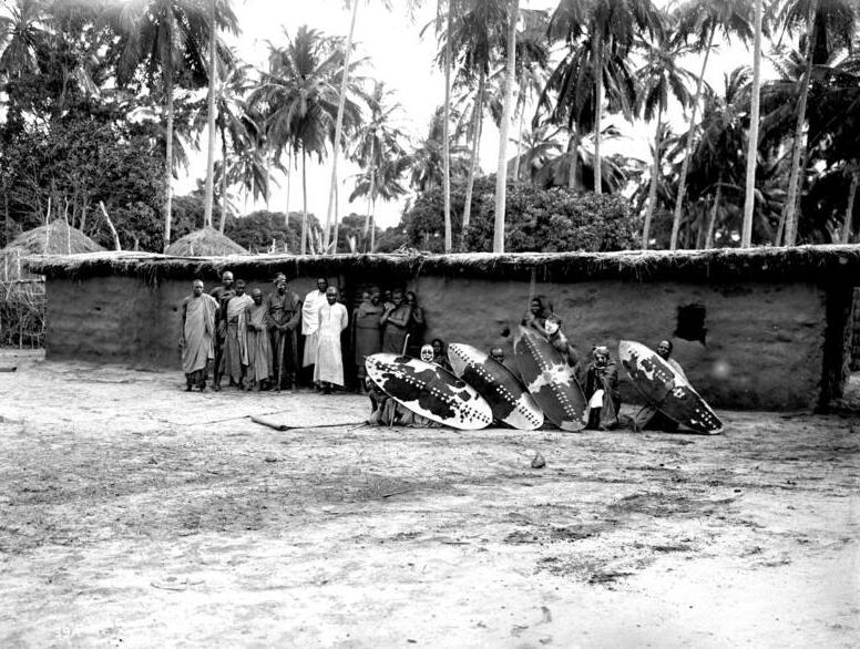 Leute aus Iringa Wahehe